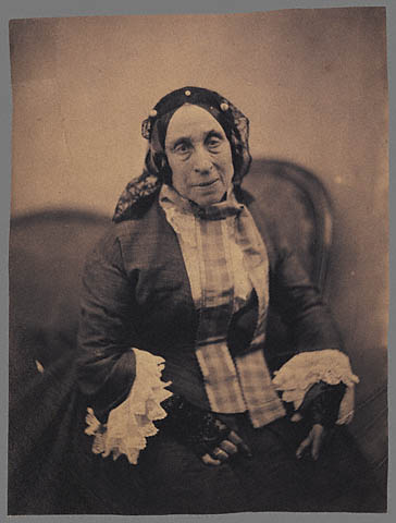 Ritratto fotografico di Marceline Desbordes-Valmore (1786-1859)